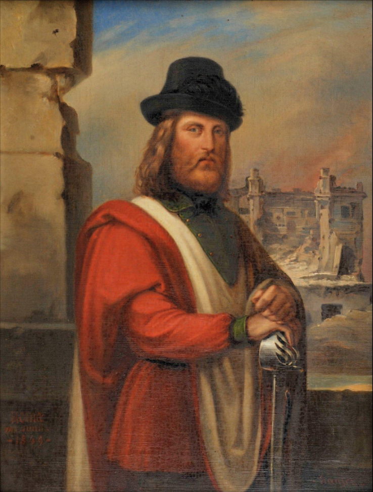 ce tableau représente Giuseppe Garibaldi à Rome, en juin 1849, dans le parc de la Villa Pamphili, devant le Casino dei quattro venti bombardé, pendant le siège de Rome par les troupes françaises dirigées par le Général Oudinot.